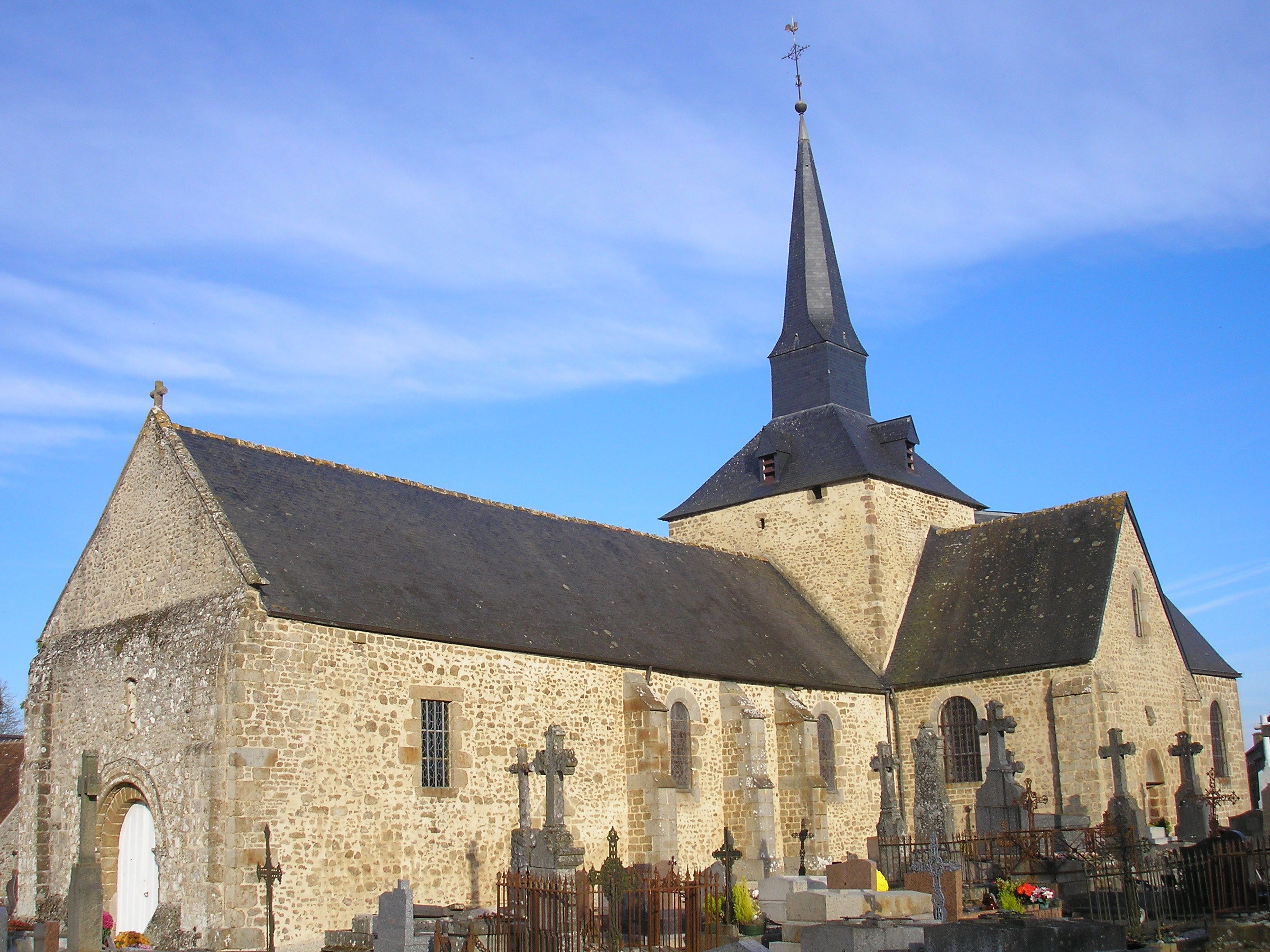 Sainte-Marguerite-de-Carrouges (Normandie, France). L'église Sainte-Marguerite.